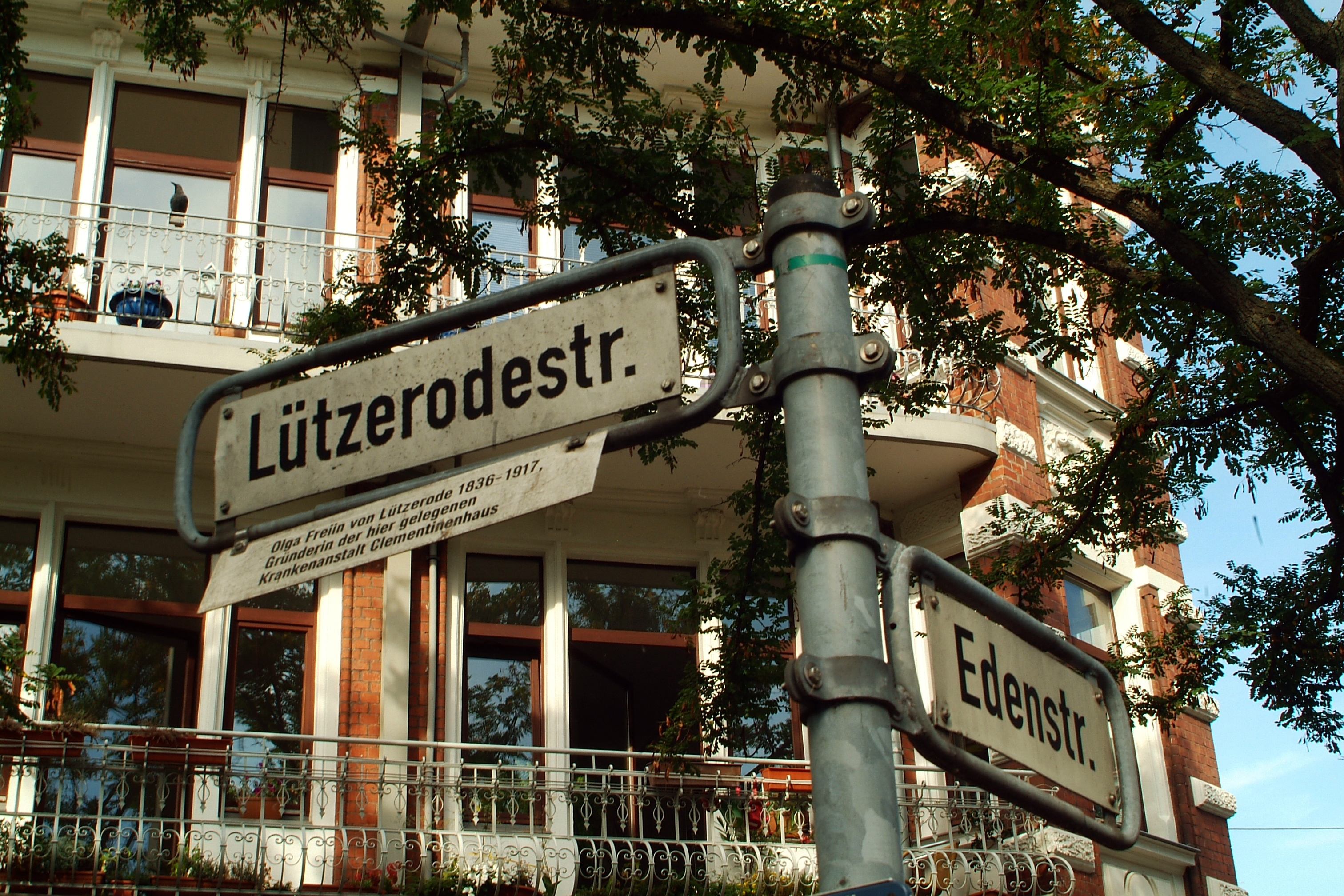 Straßenschild an der Ecke Lützerodestraße/Edenstraße mit einem Zusatzschild zur Erläuterung der Bedeutung von Olga Freiin von Lützerode